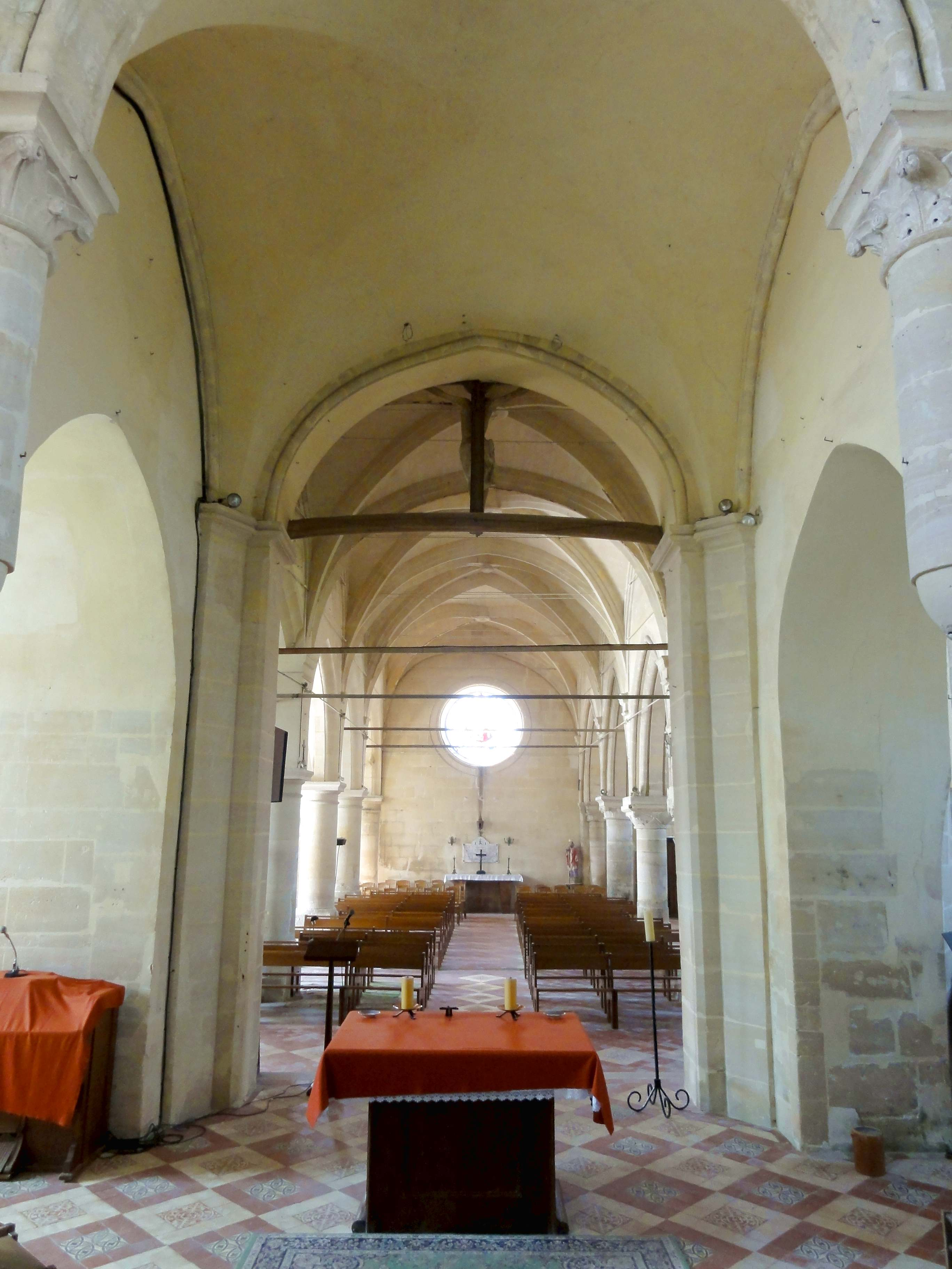 Intérieur de l'église (voir titre).